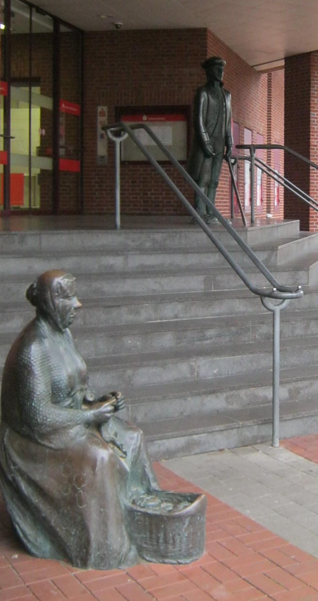 Stutentrine und Markgraf, Rendburger Symbolfiguren als Bronzesatuen